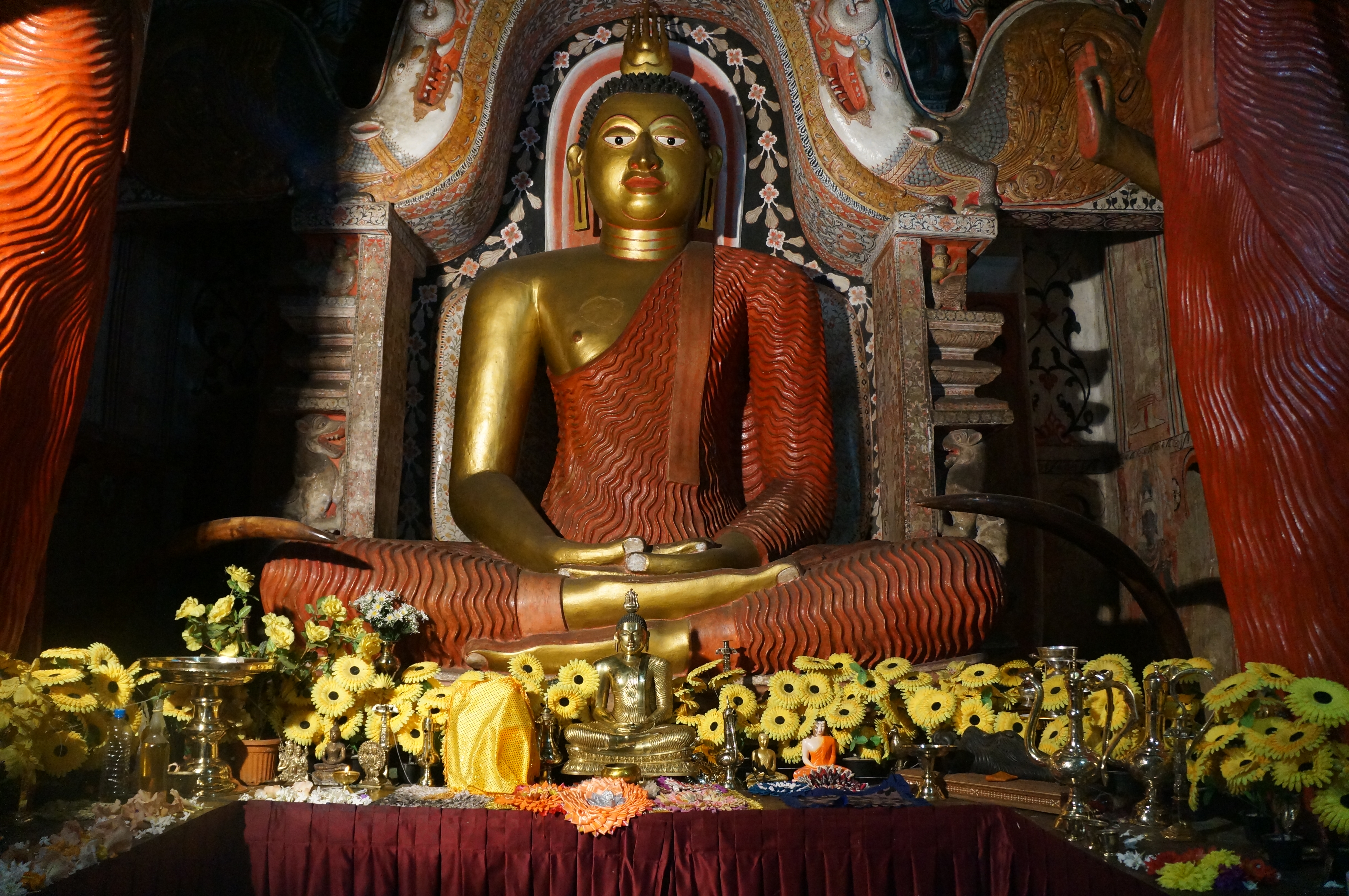 Le temple Lankathilaka Viharaya à Kandy Sri Lanka.- Asie du Sud